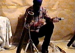 Miembro del EVPR sosteniendo un mortero durante un comunicado